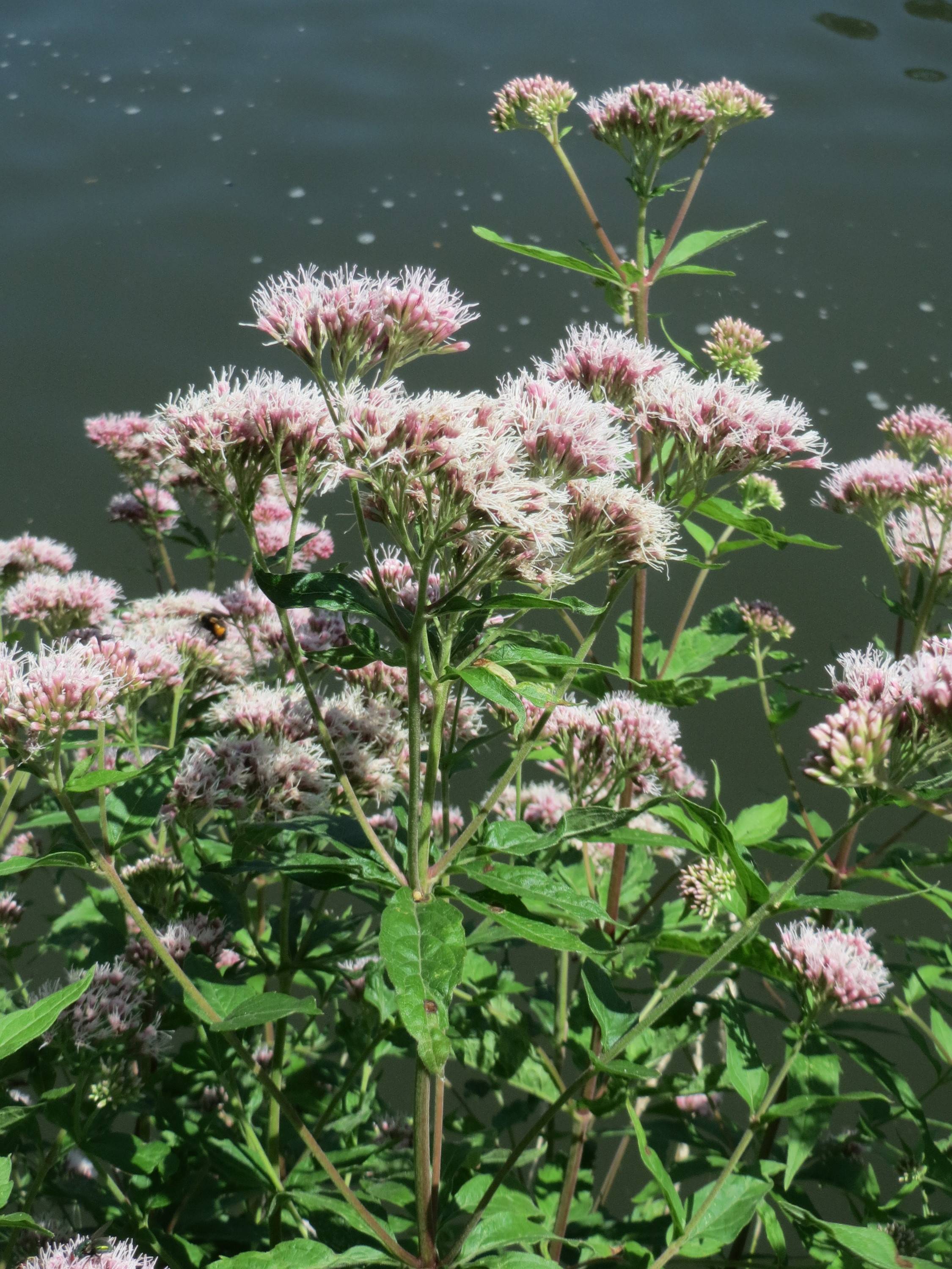 Gewöhnlicher Wasserdost (Eupatorium cannabinum) an der Saar in Sankt Arnual